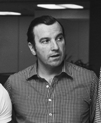 Arrivée de l'Athletic Bilbao à l'aéroport d'Amsterdam-Schiphol. L'entraîneur Aguirre. Photographie par Bert Verhoeff / Anefo.